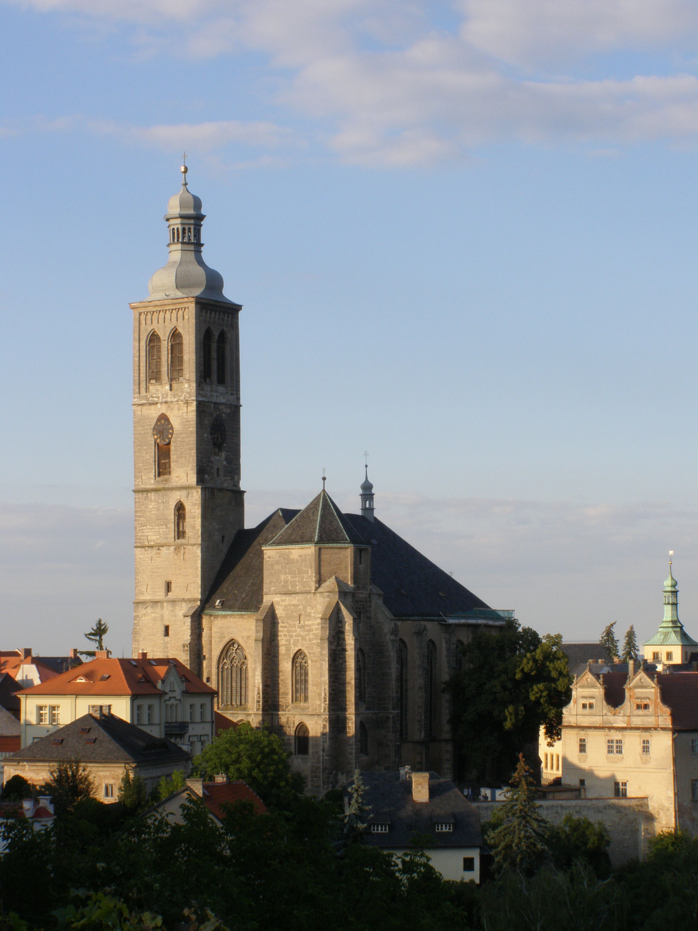 Kutná Hora, část Kutná Hora-Vnitřní Město, pohled z ulice Barborská na kostel sv. Jakuba